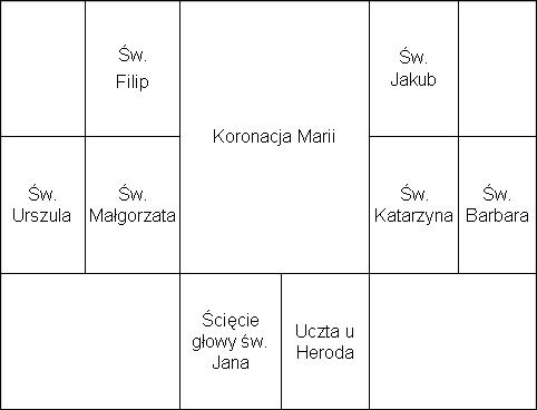 opis pól dawnego ołtarza głównego kościoła św. Jana w Stargardzie Szczecińskim.